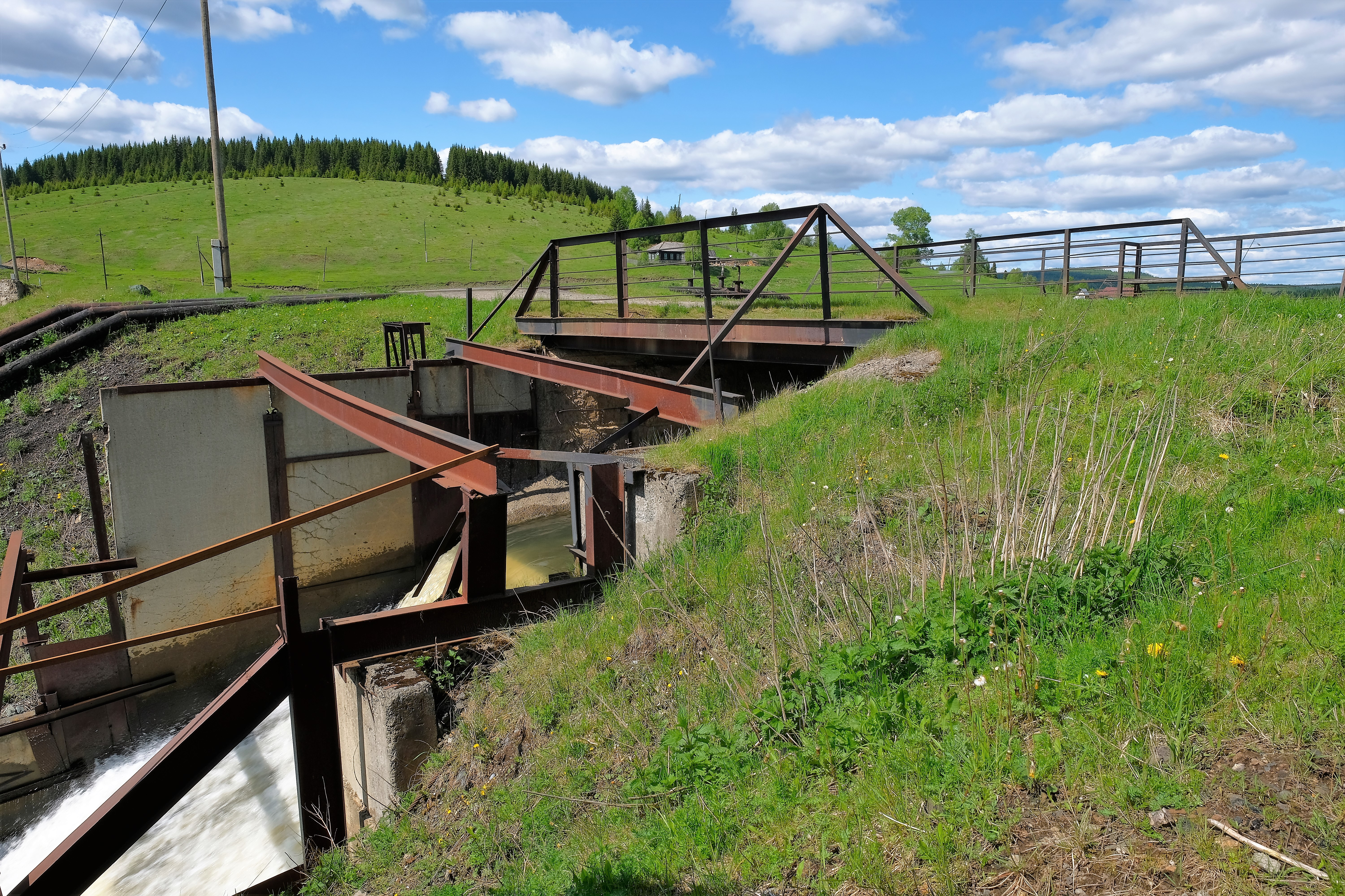 Посёлок Старый Бисер Горнозаводского района Пермского края. Плотина пруда.